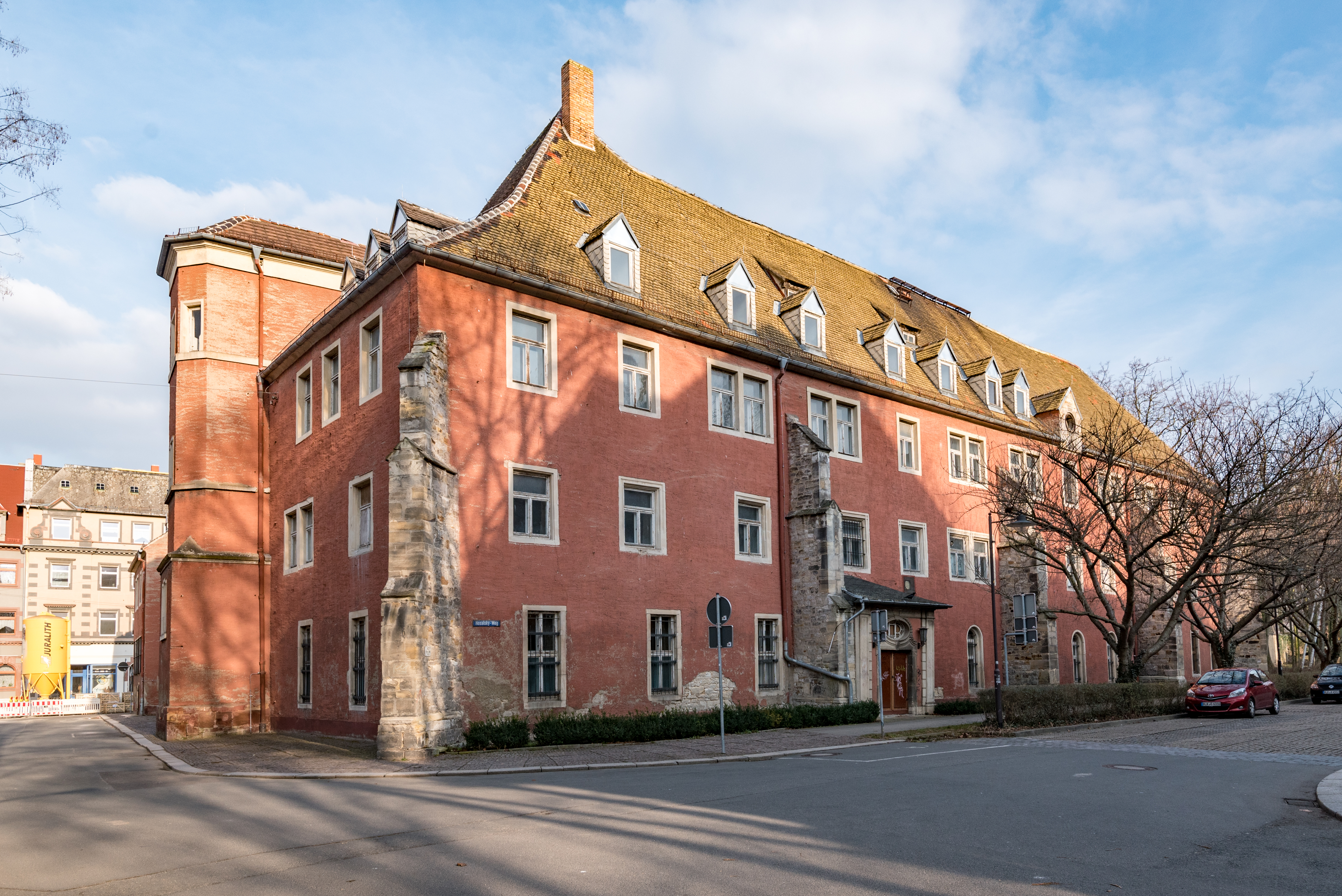 Weißenfels, Am Kloster 2